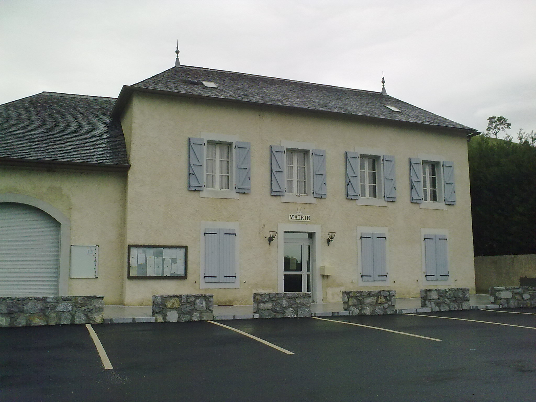 Asasp-Arros, France